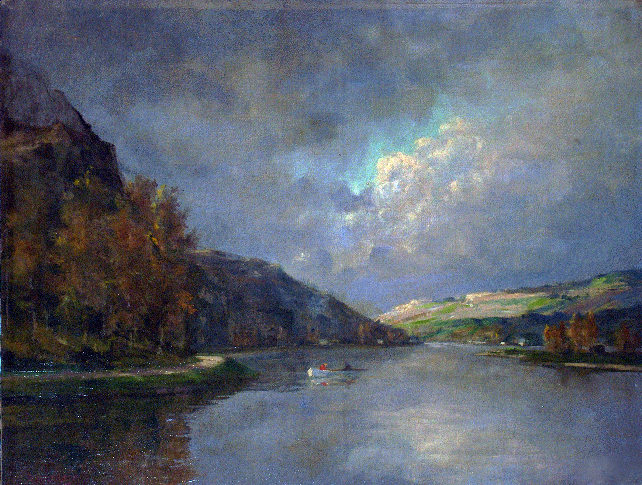 "Maaslandschap" - olieverf op doek - Adolphe Hamesse (1849-1925) - privé-bezit